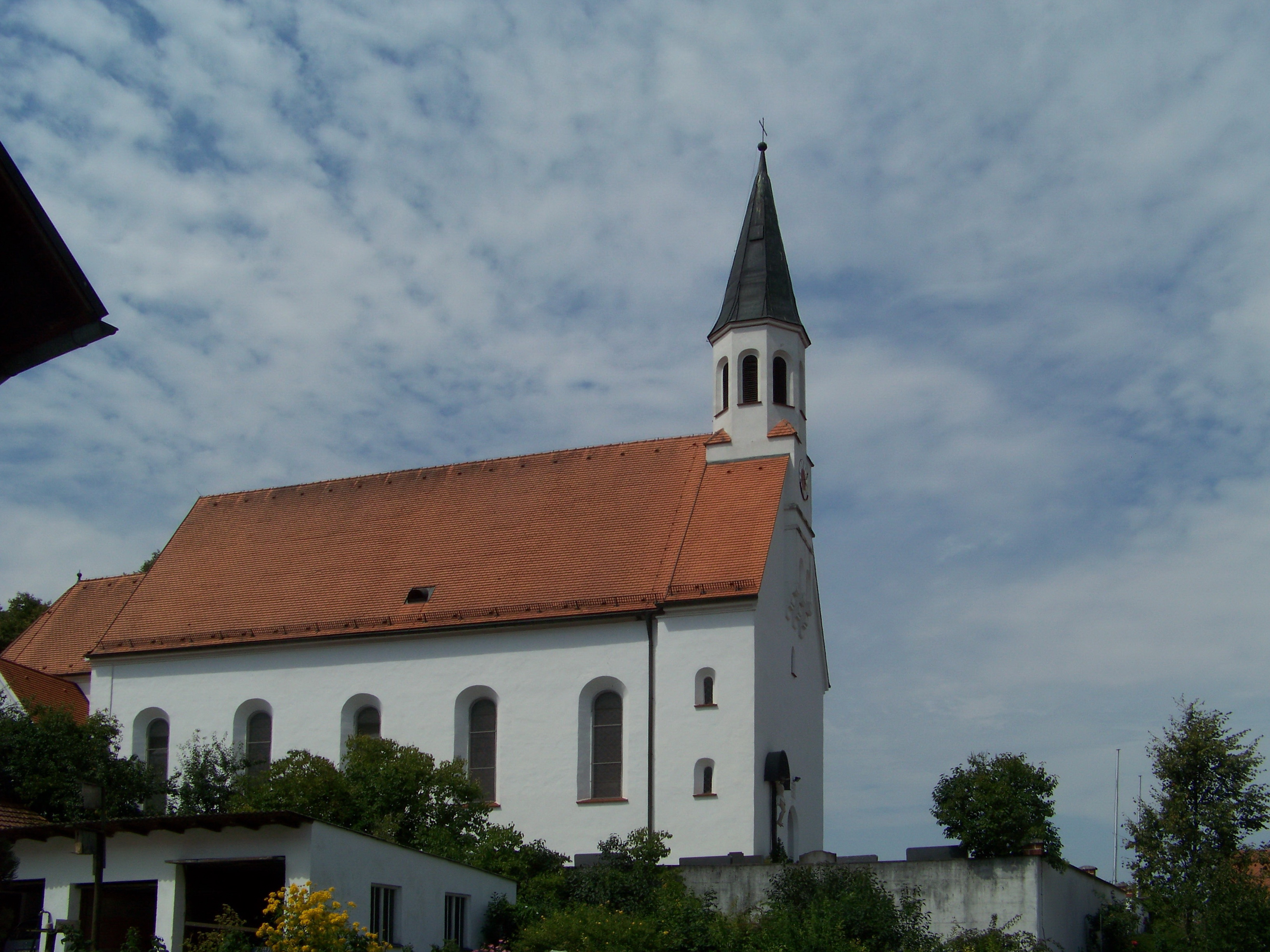 Geisenfeld, Unterpindhart, St.-Georg-Straße 36. Katholische Pfarrkirche St. Georg mit Dachreiter aus dem Jahre 1842, mit neuromanischer Ausstattung.